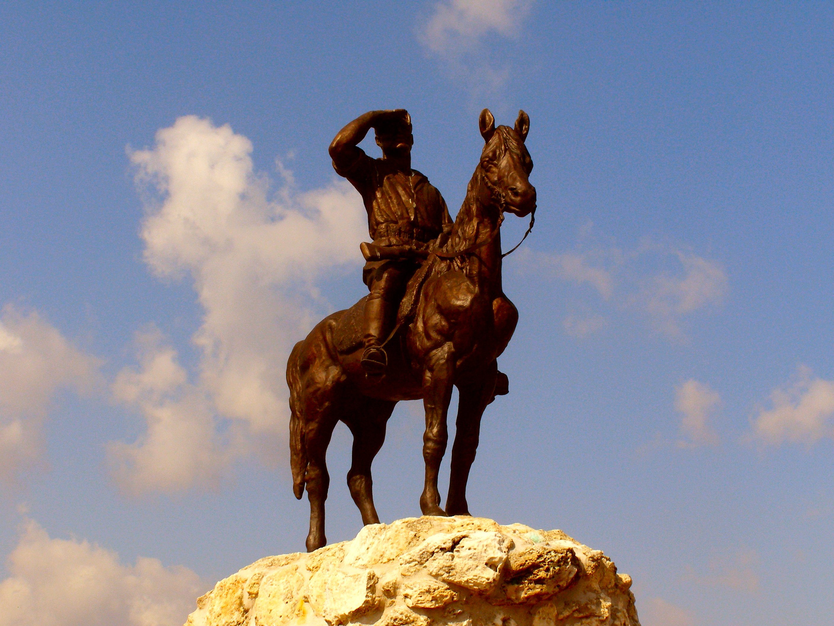 Alexander Zaïd1